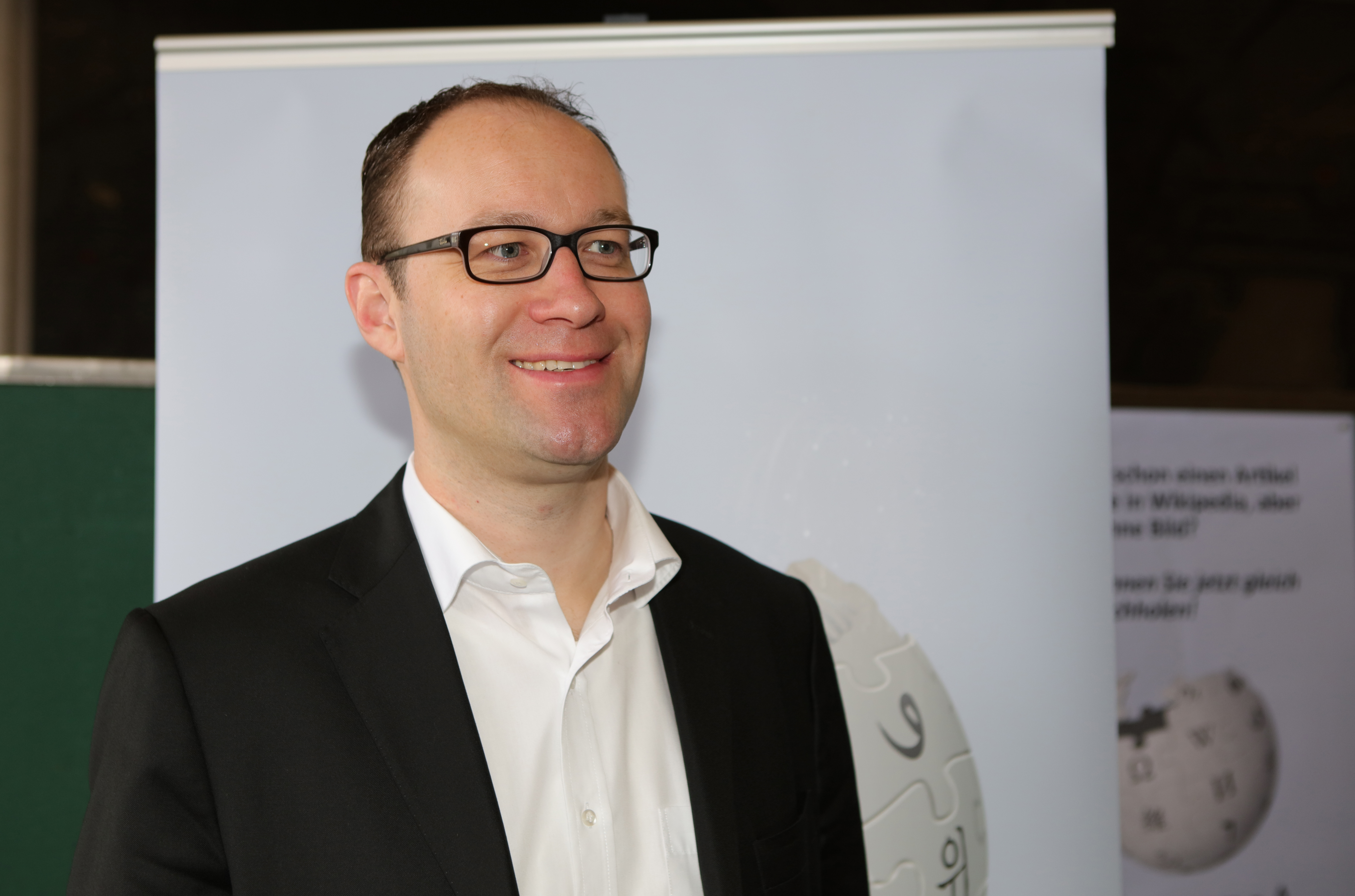 Prof. Dr. Daniel B._Werz von der Technischen Universität Braunschweig (Deutschland) am Wikipedia Stand, auf der Chemiedozententagung 2016 in der Universität Heidelberg bzw. der Mitgliederversammlung der Arbeitsgemeinschaft Deutscher Universitätsprofessoren und -professorinnen für Chemie (ADUC).